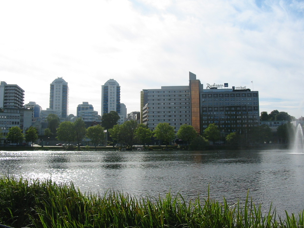 Stavanger Skyline